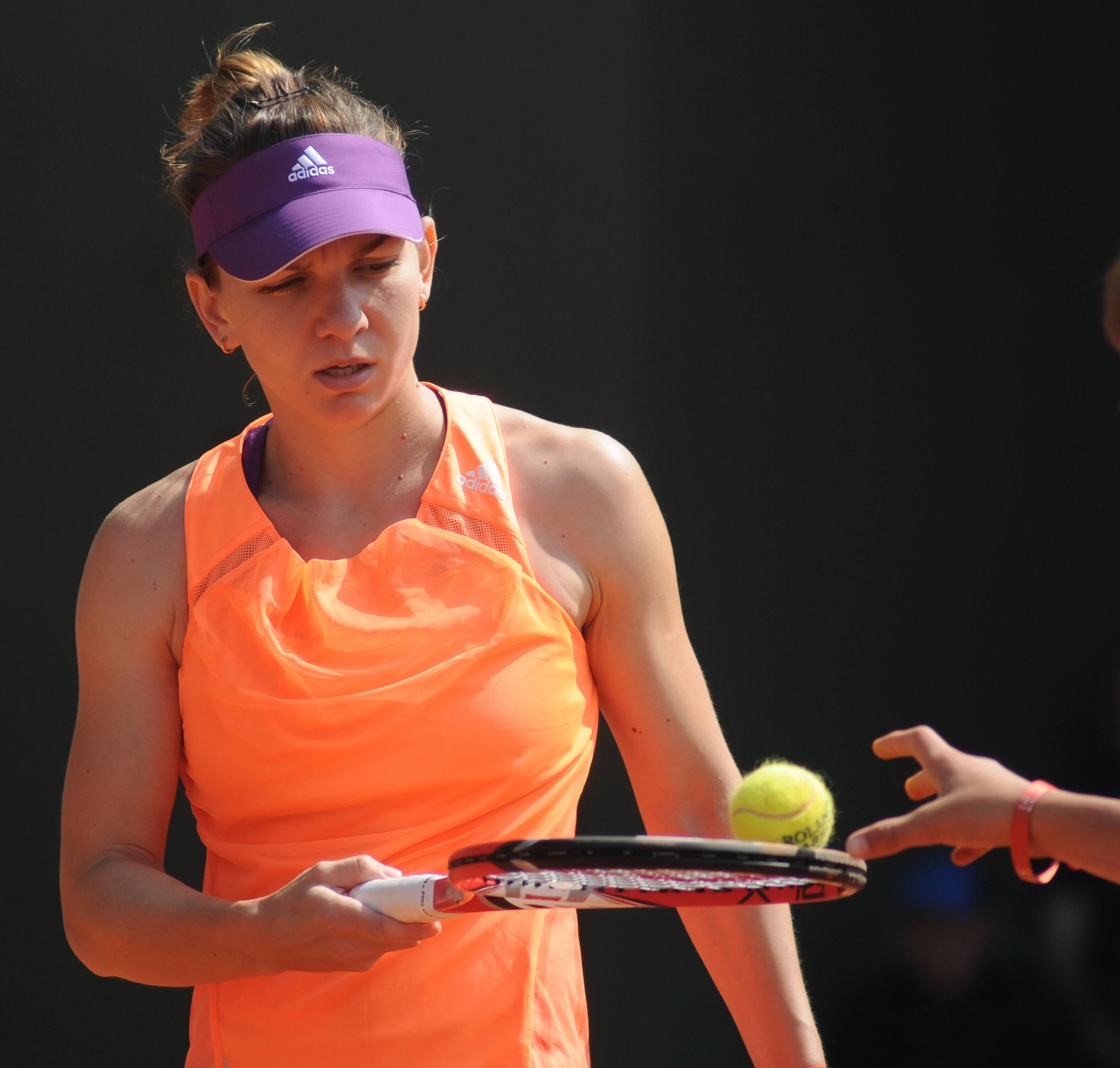 Simona Halep